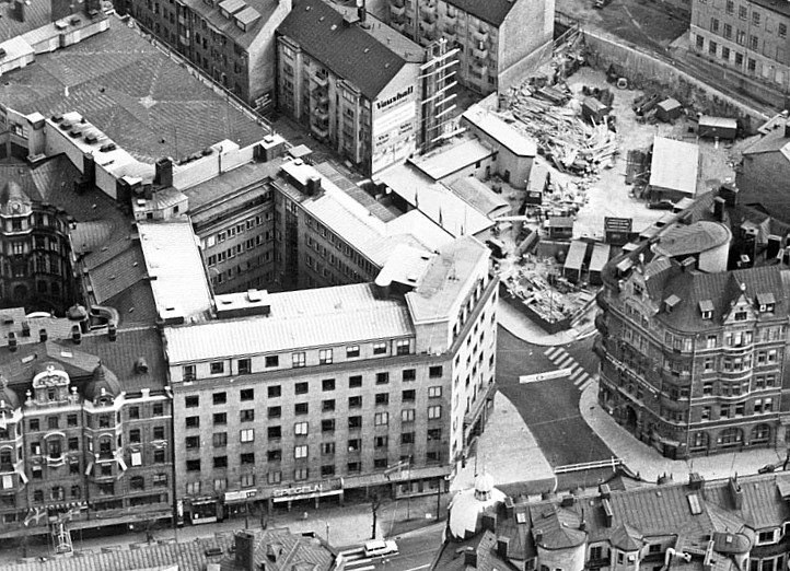 Birger Jarlsgatan 16 och hörnet Grev Turegatan